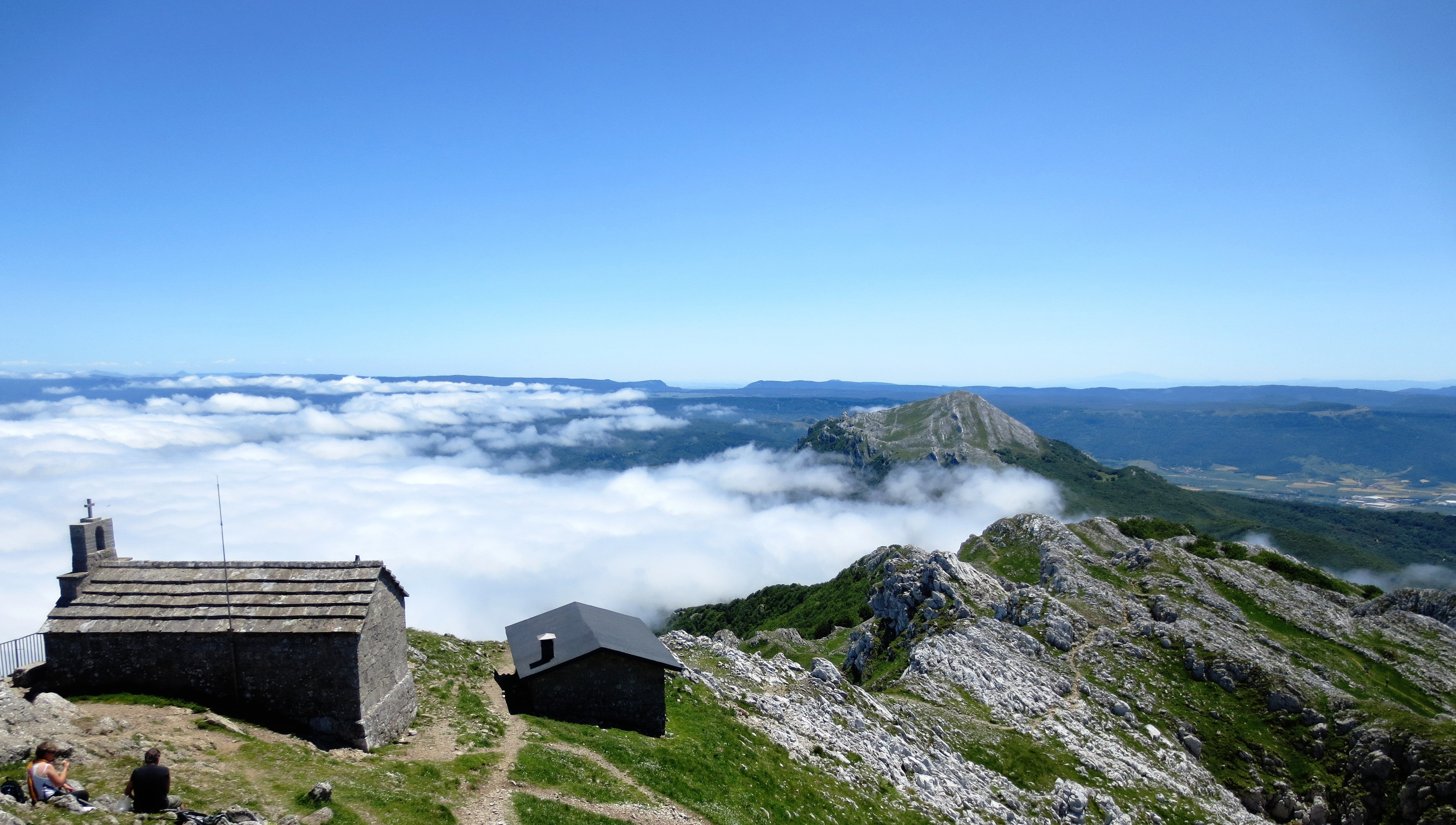 Aizkorritik Aratzera begira, atzean Aralar, Andia eta Sakana duela